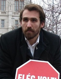 Vágó Gábor (LMp egy 2011. decemberi tüntetésen a parlament előtt.